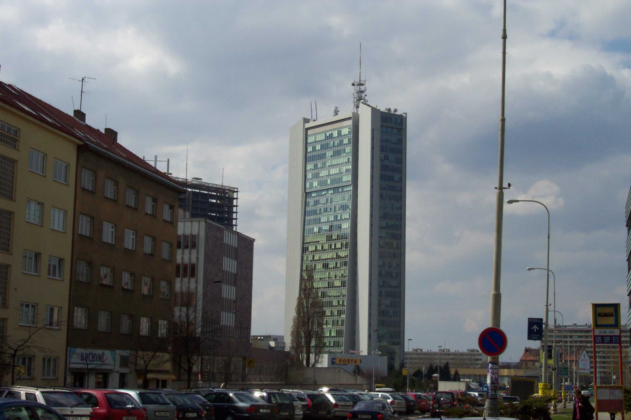 Motokov bulding in Prague-Pankrác (now it has different usage) - Budova Motokovu na Pankráci (dnes však má již jiné využití)